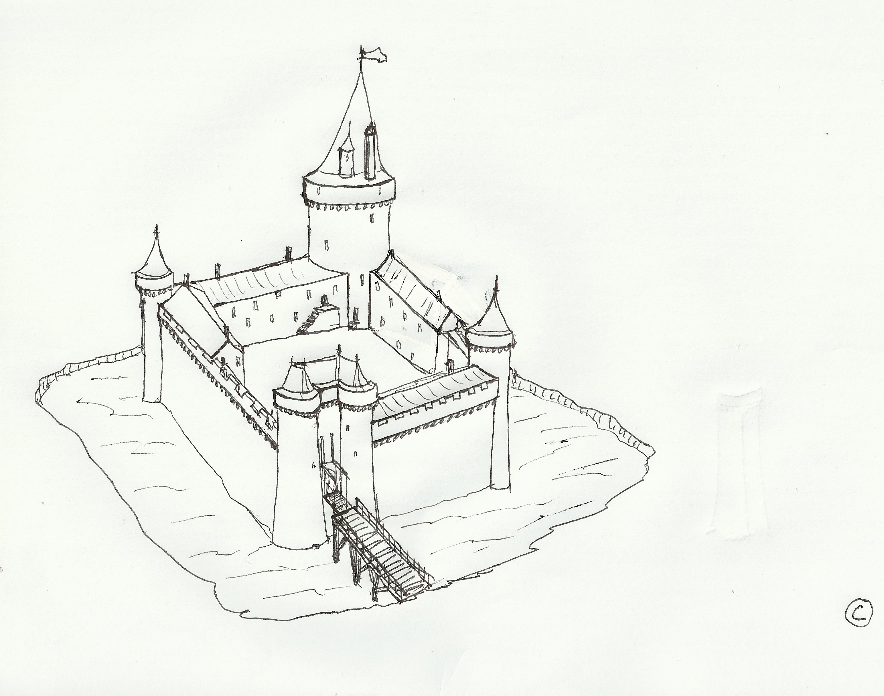 Croquis montrant une possible restitution du château fortifié du Guy à St Denis du Payré.